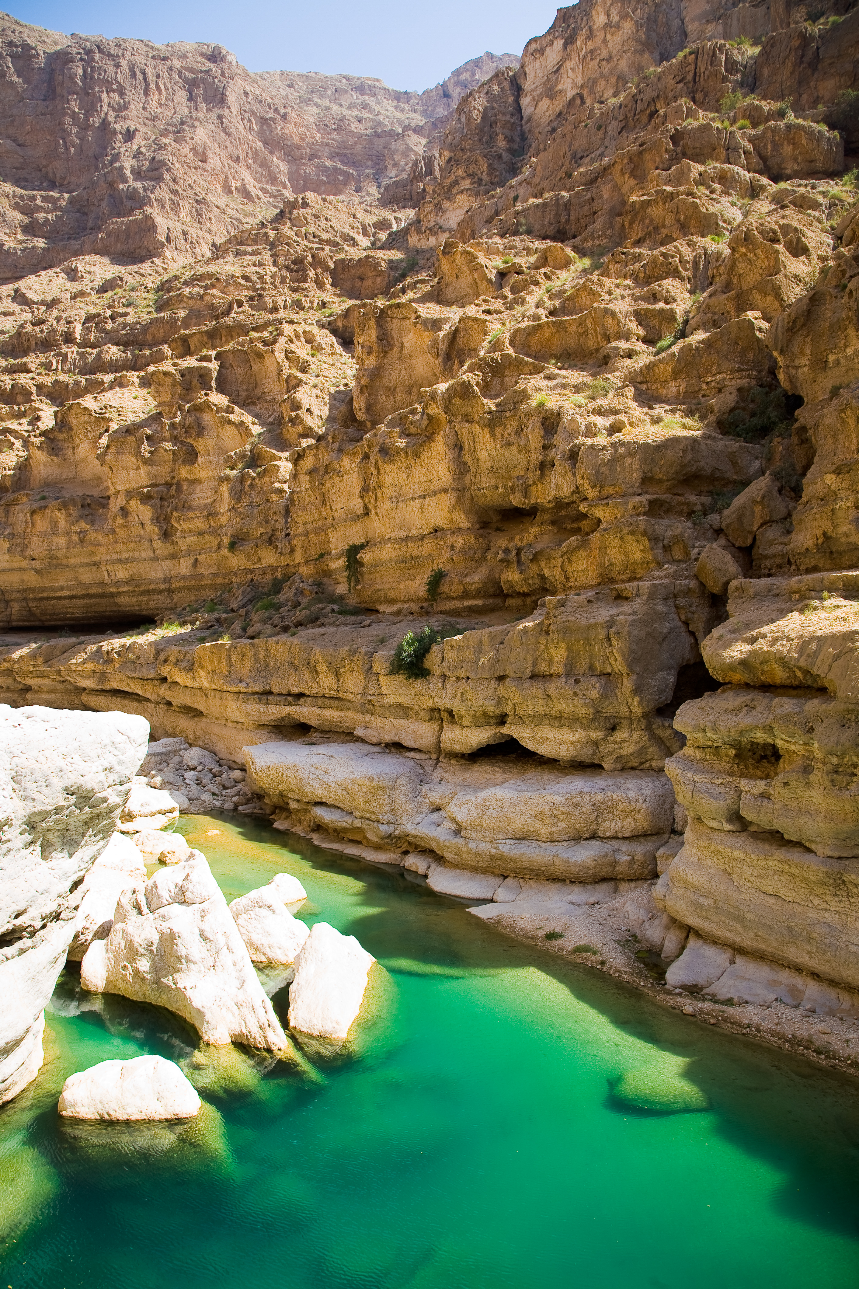 Wadi Shab, Oman